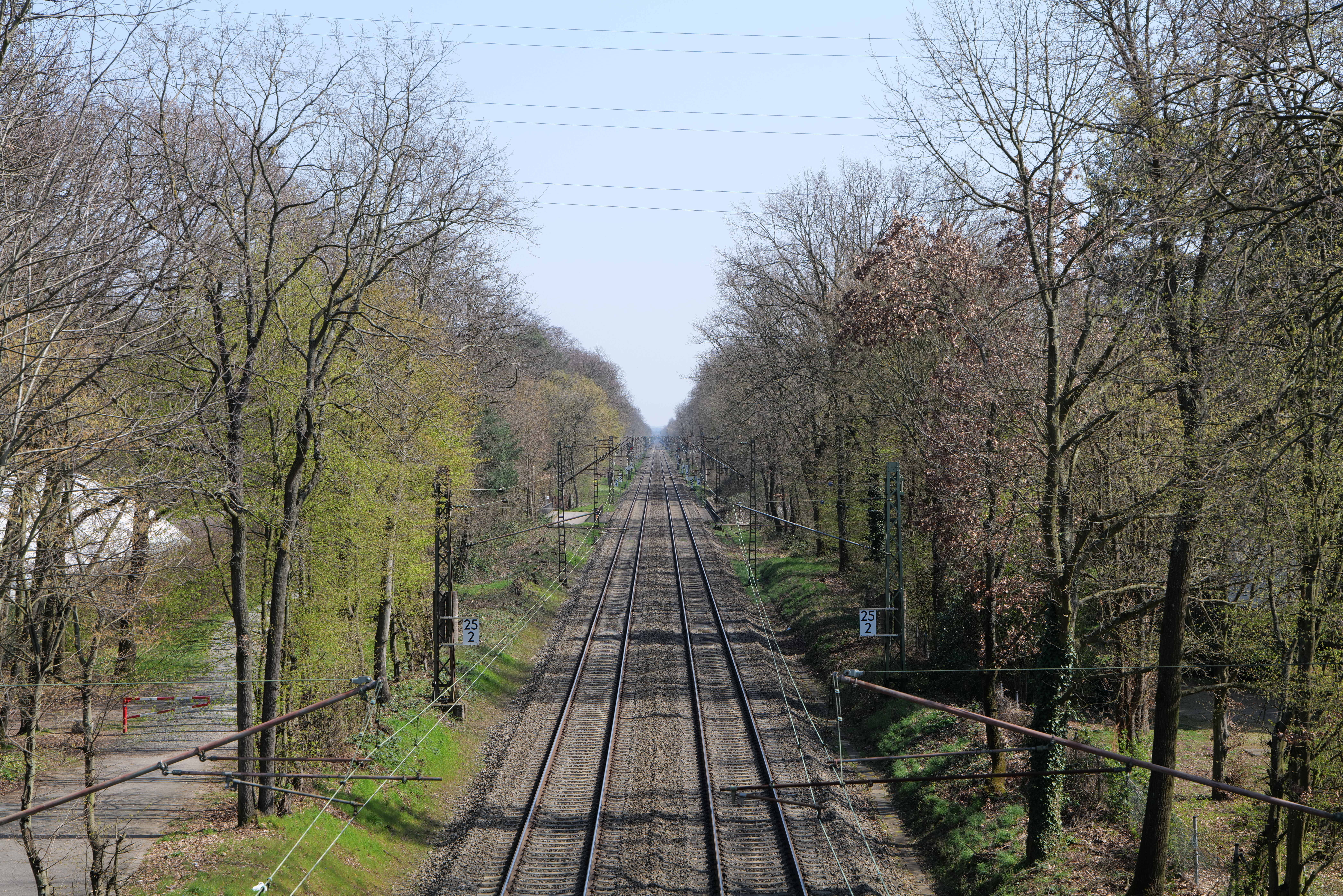 Schwanheimer Wald am 27. März 2020.